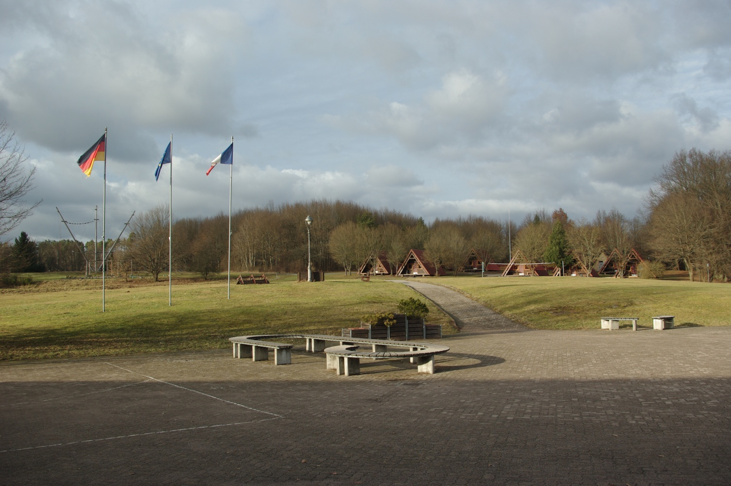 Zelthütten der Jugendfreizeit- und Bildungsstätte Baerenthal des Stadtjugendausschuss e.V. Karlsruhe.